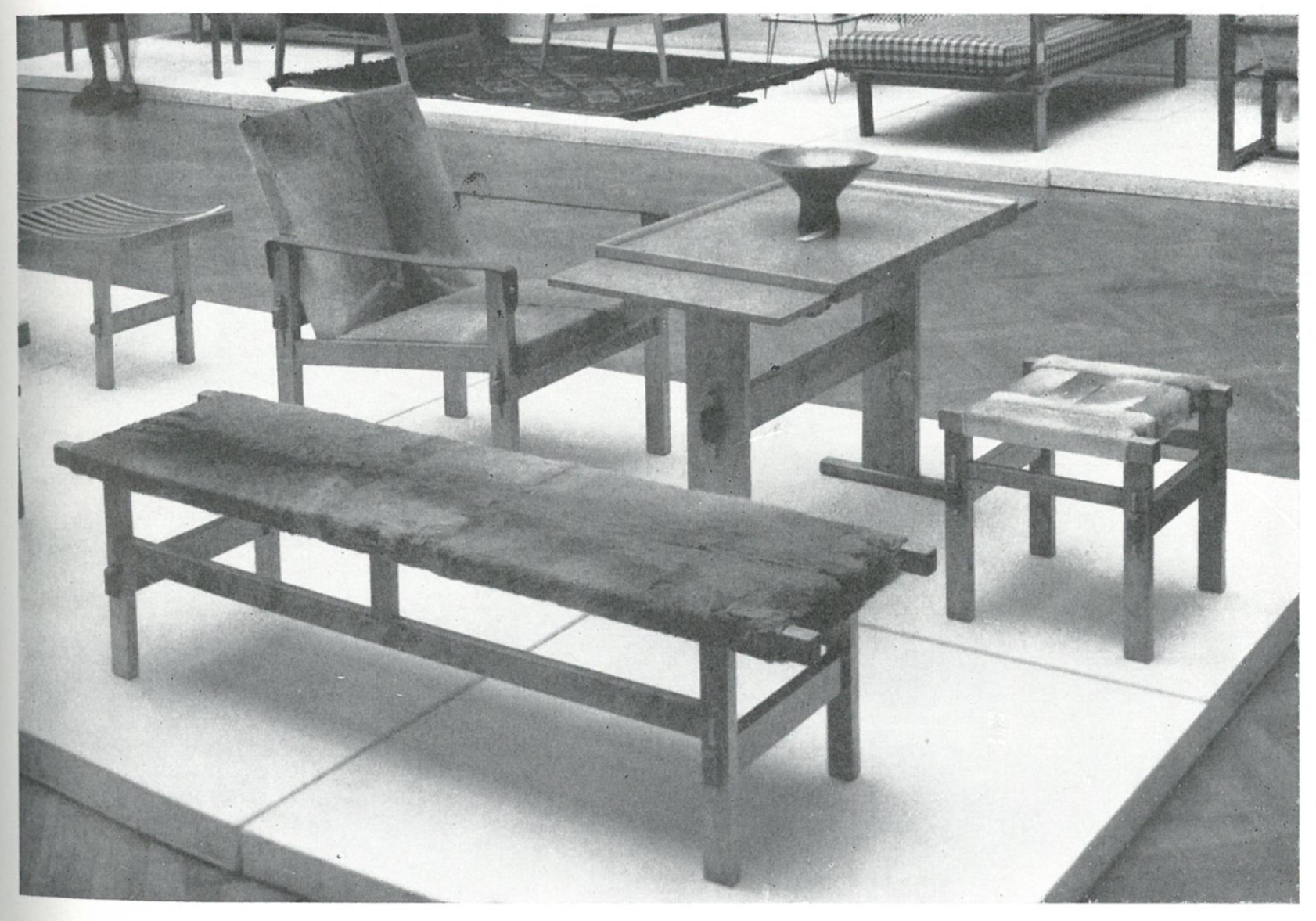 meble proj. Izabeli Szerskiej-Sternińskiej (Spółdzielnia Artystów Plastyków "Ład"): stolik z tacą, fotel kryty skórą, ława kryta skórą i taboret kryty skórą (zestaw mebli mieszkalnych, brzoza barwiona) oraz ława ze szczeblin demontowana (fragment, po lewej, z zestawu brzostowych mebli mieszkalnych). Źródło: "40 lat Ładu", Warszawa: Zachęta Centralne Biuro Wystaw Artystycznych 1967, s. 66, 127